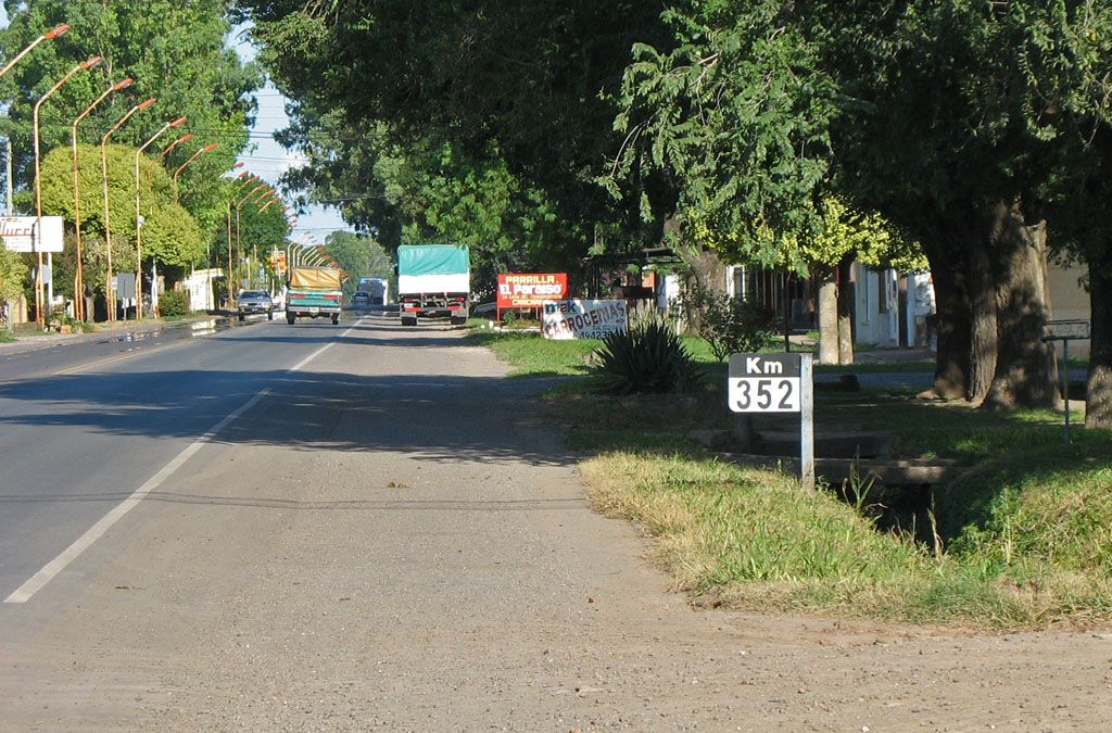 Ruta nacional 9 en su paso por la ciudad de Carcarañá, provincia de Santa Fe, Argentina.